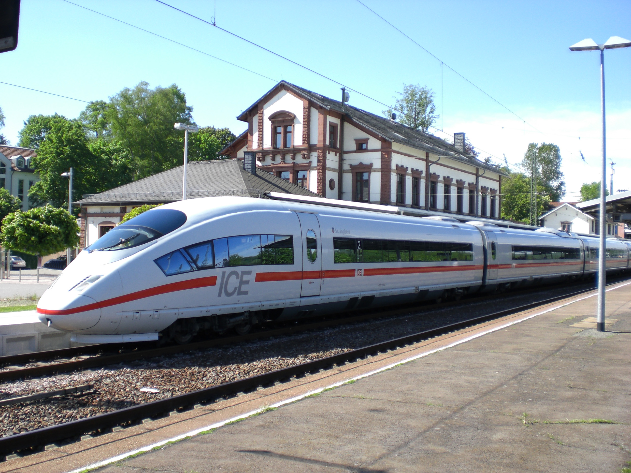 ICE "St. Ingbert" am Tag seiner Taufe in seiner Heimatstadt St. Ingbert